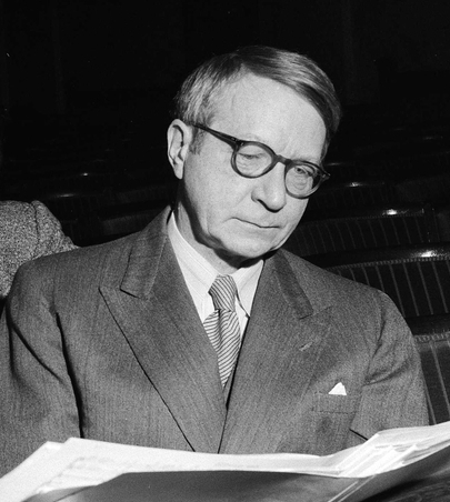 Prøver med Oslofilharmonien i Universitetets aula. Ludvig Irgens-Jensen. Foto: Leif Ørnelund (1953).Depicted person: Ludvig Irgens-Jensen – Norwegian composer